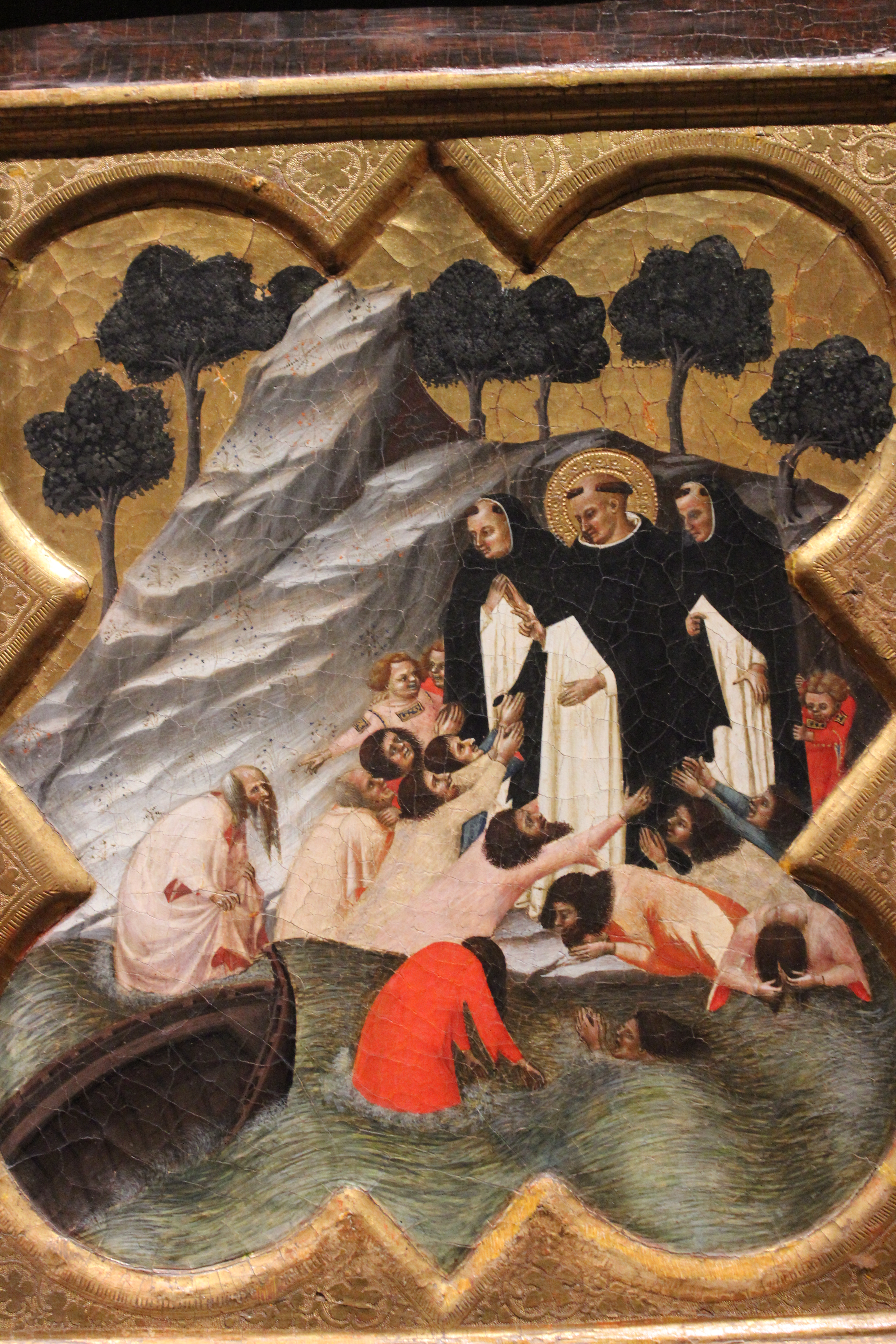 Francesco Traini. Políptico de Santo Domingo de Guzmán. Museo di San Matteo. Pisa.